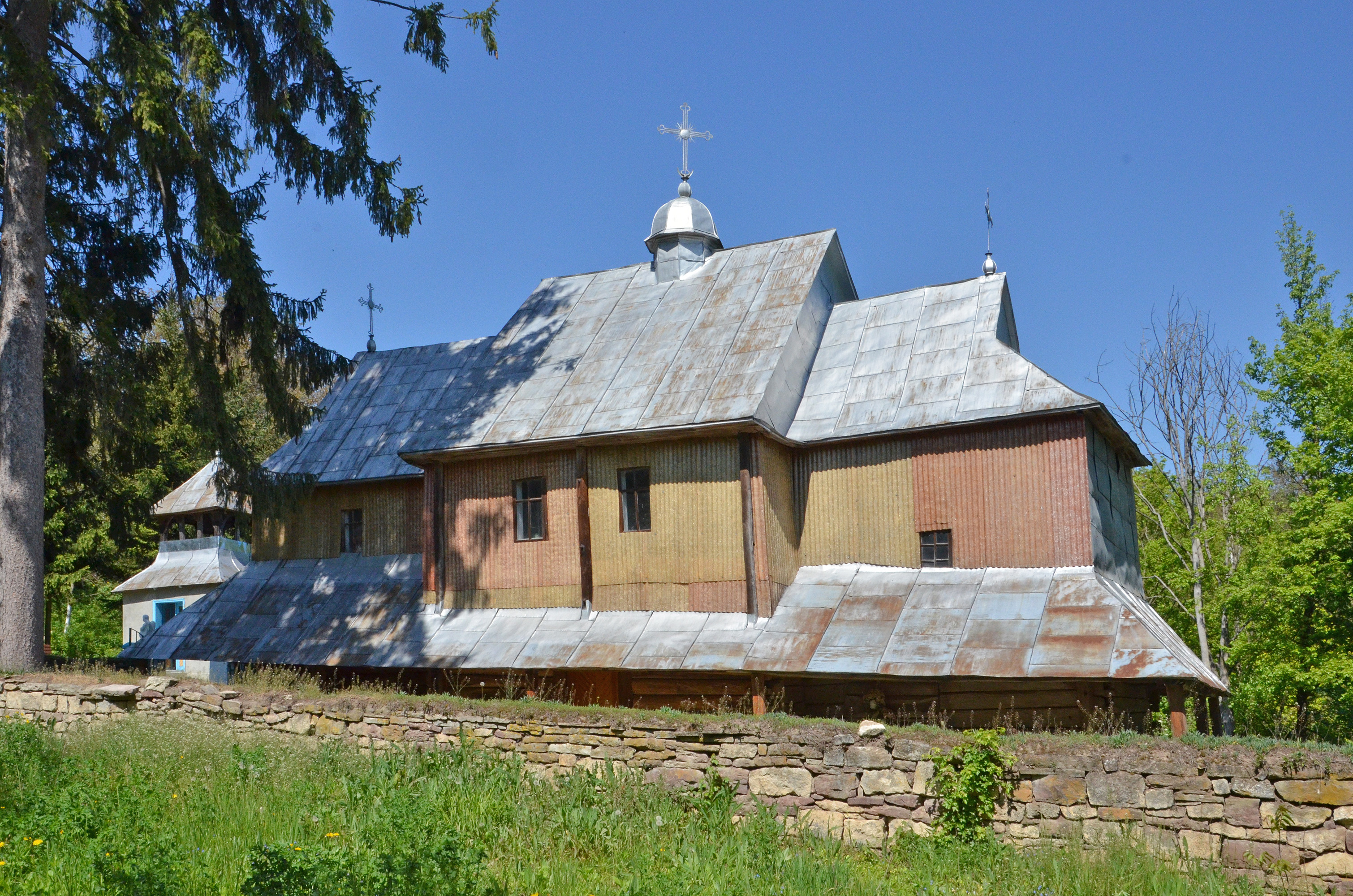 Церква Покрови Пресвятої Богородиці (дер.), село Сокілець Бучацького району Тернопільської області.